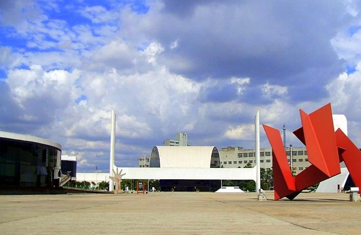 Memorial da América Latina, de Oscar Niemeyer. Em primeiro plano, a escultura "Grande Flor Tropical", de Franz Weissmann